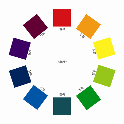 색상환표